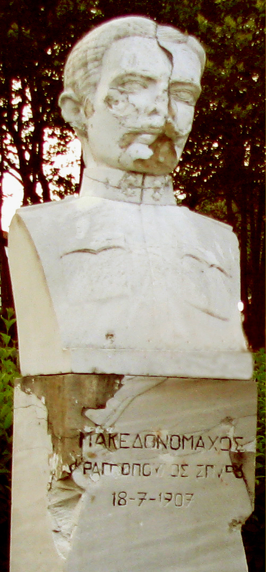 Γρίβας - Σπυρίδων Φραγκόπουλος